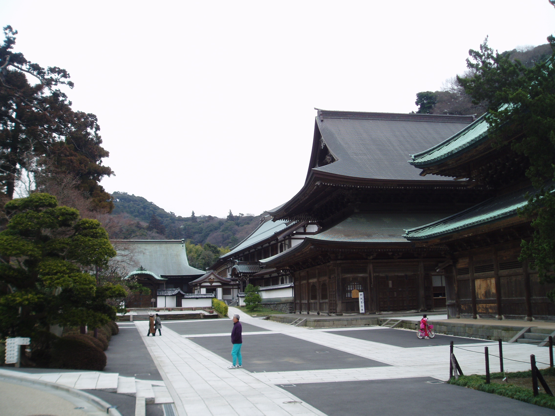 The temple Kencho-ji in Kamakura, Kanagawa, Japan